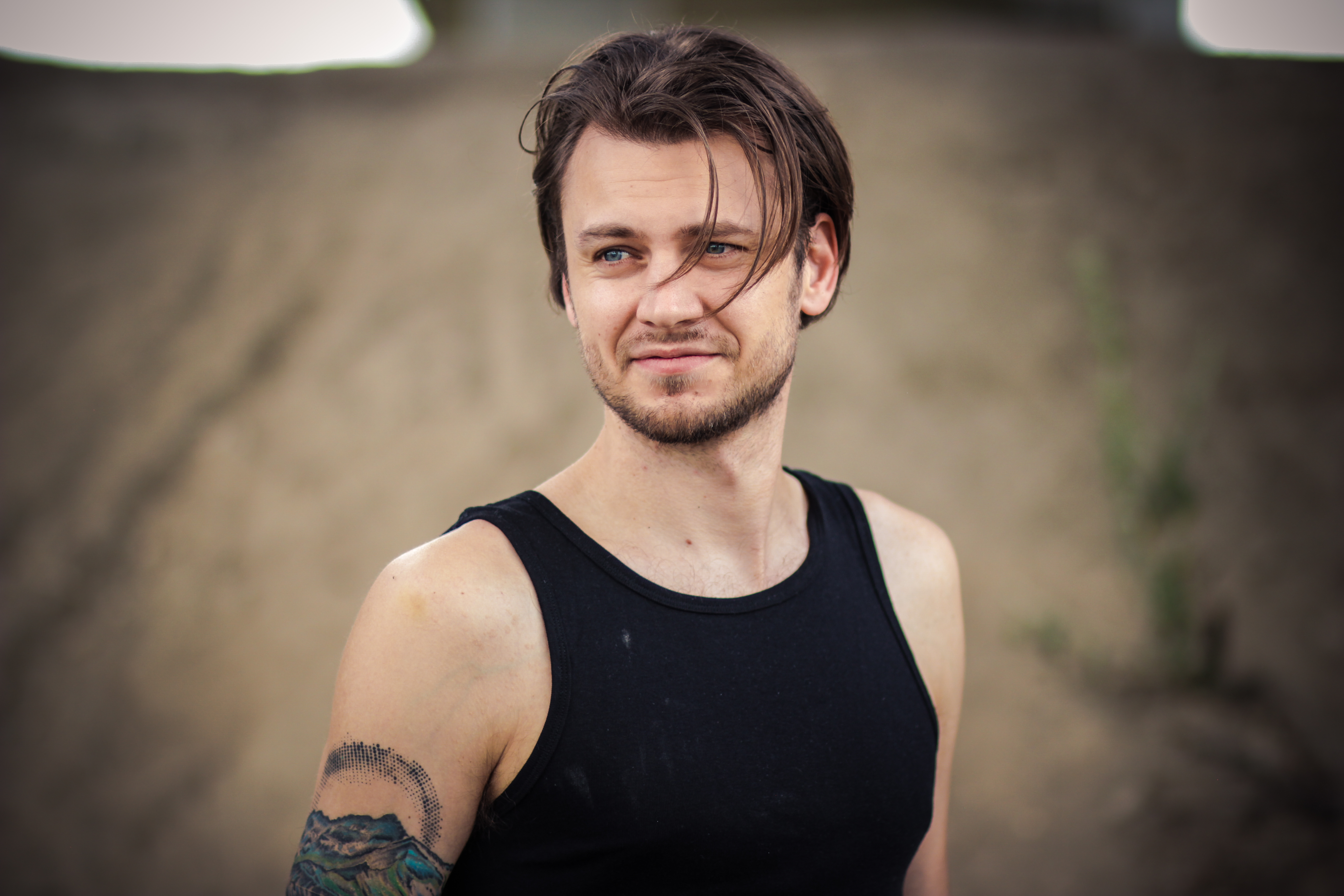 Wien